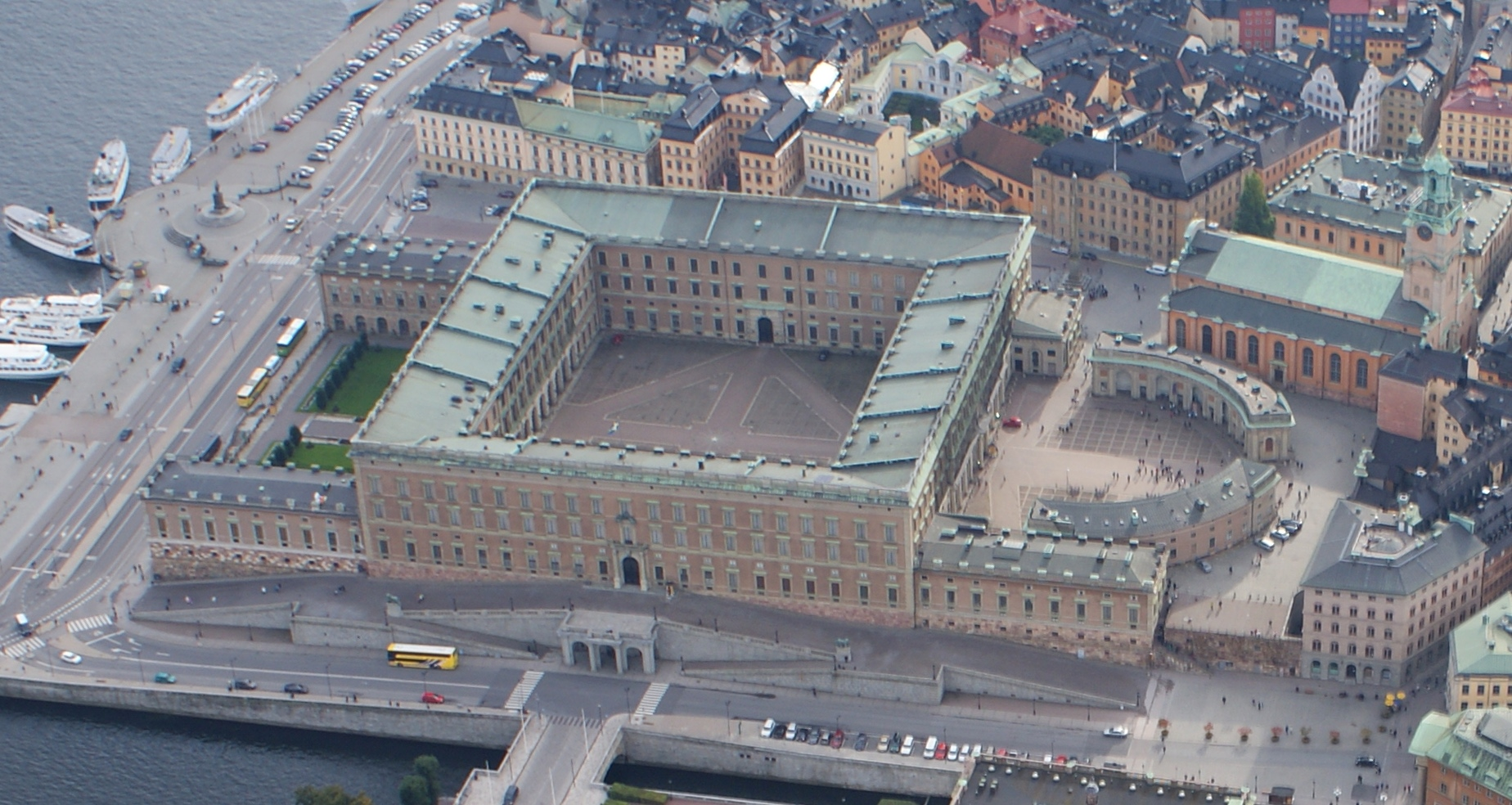 Kungliga slottet sett från helikoper.